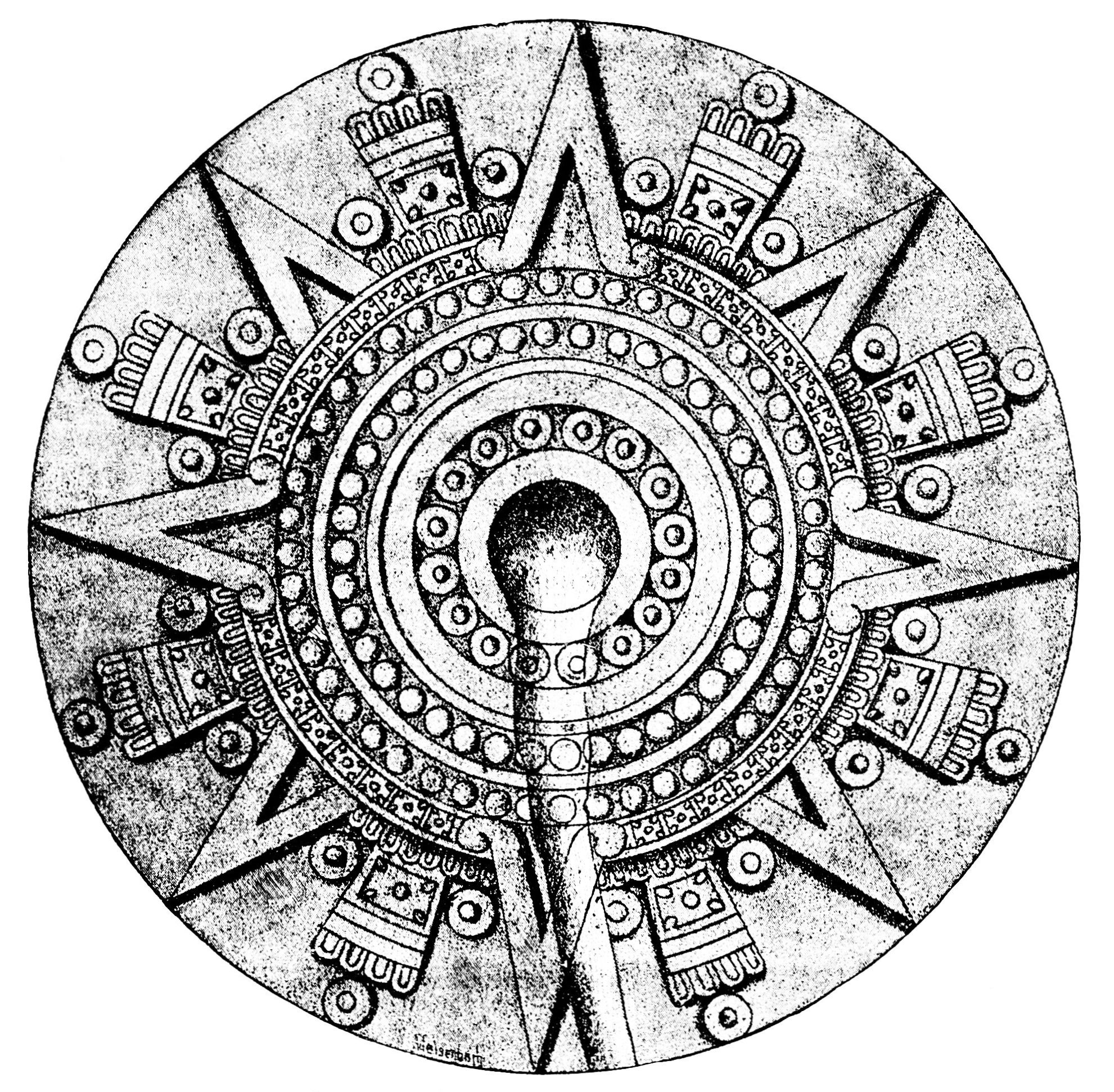 Sacrificial stone or Cuauhxicalli of Tizoc